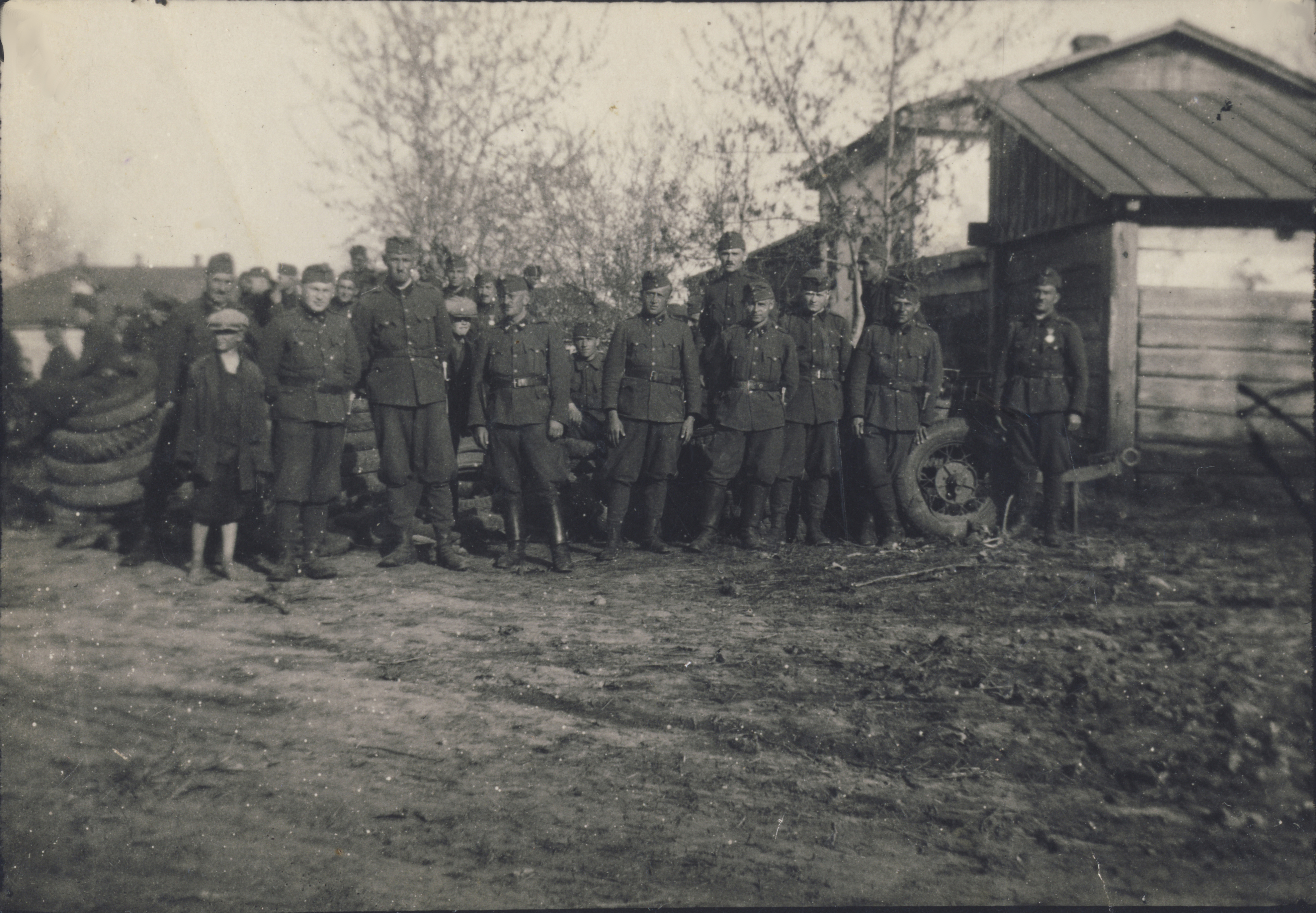 Valahol Oroszországban a Zene téren - Dimitriew 1942. V. 27., Bucz Sándor hagyatéka